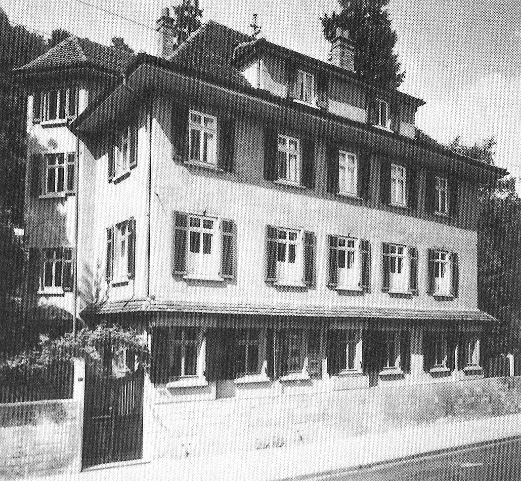 Tübingen. Gartenstraße 19, Bürohaus des Schwäbischen Albvereins. Das „flotte“ Haus geht auf das frühere Autenriethsche Sommerhaus zurück. Nachdem der Schwäbische Albverein den nach der Verbreiterung der Gartenstraße übrig gebliebenen Stümmel 1925 gekauft hatte, ließ er ihn vom Architekten Gustav Stähle umbauen. Neu gebaut wurde die westliche Hälfte mit dem Treppenhaus und der obere Stock.